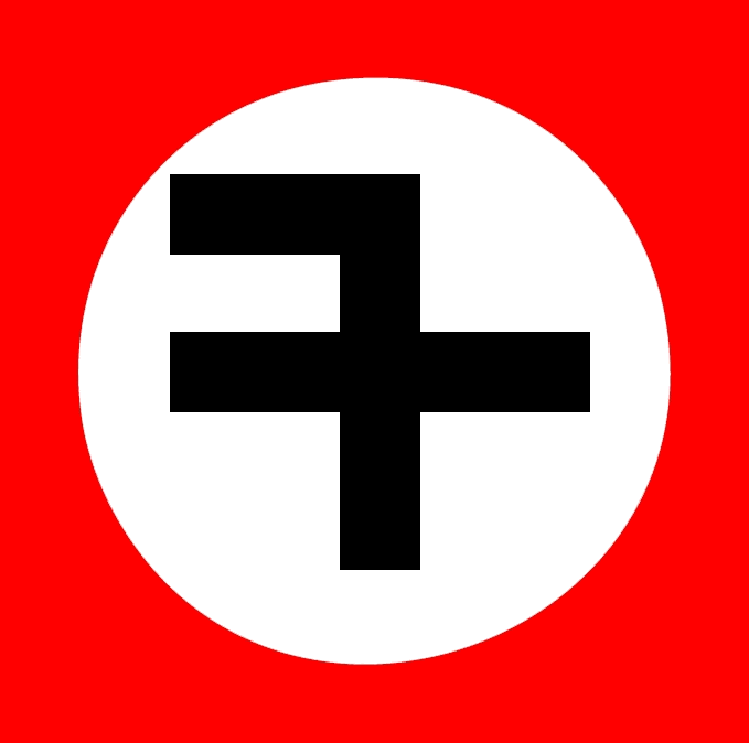 Logotipo del Partido Nuevo Triunfo, partido neo nazi argentino